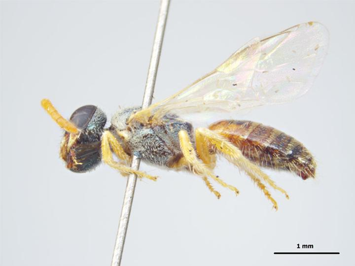 Lasioglossum imitatum (syn. Homalictus imitatus) male